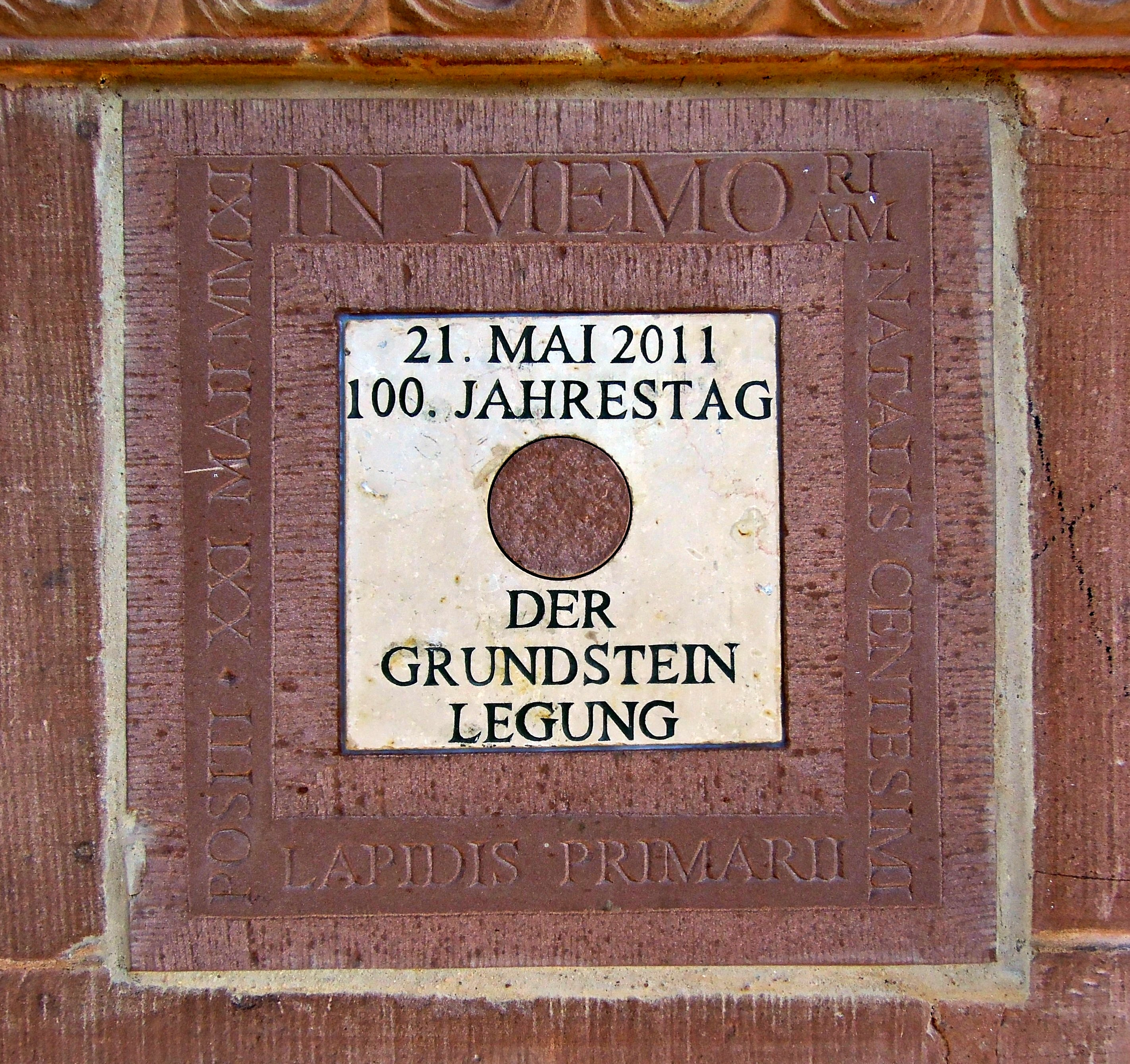 Gedenkstein anlässlich der Grundsteinlegung vor 100 Jahren